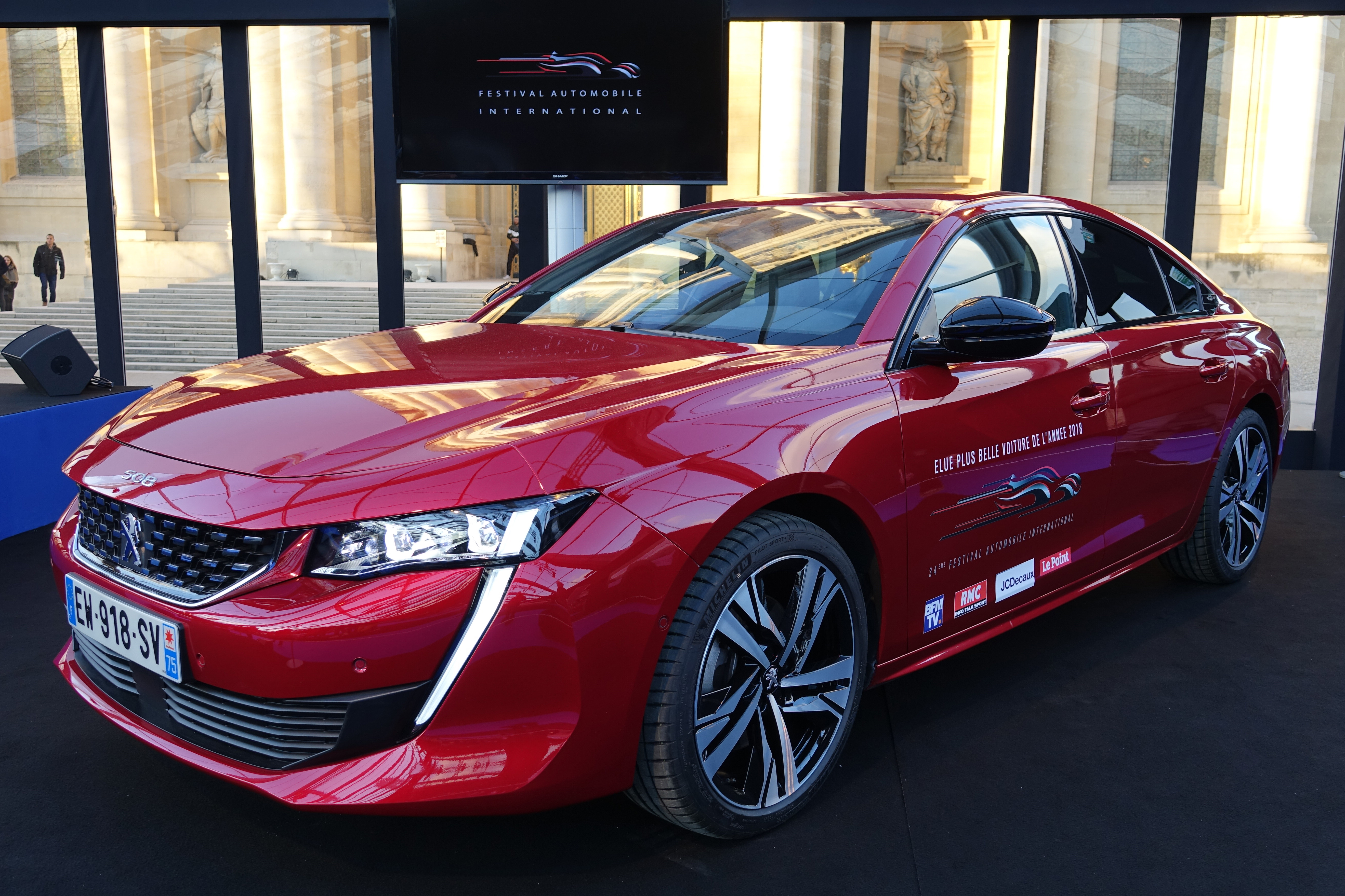 Peugeot 508 élue plus belle voiture de l'année 2018 au Festival Automobile International 2019